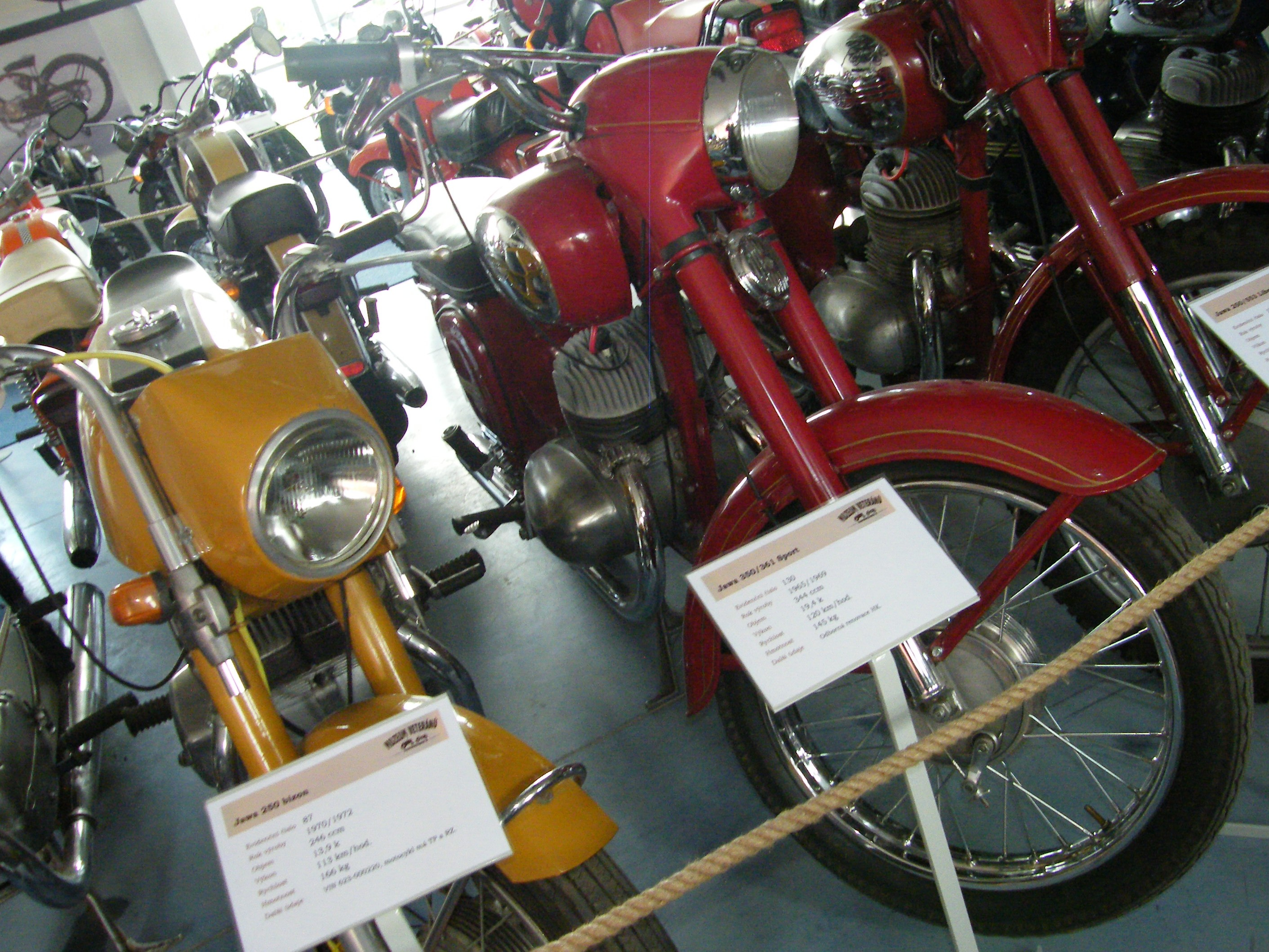 Jawa 350/361 Sport